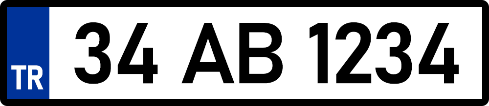 نمونه پلاک ترکیه